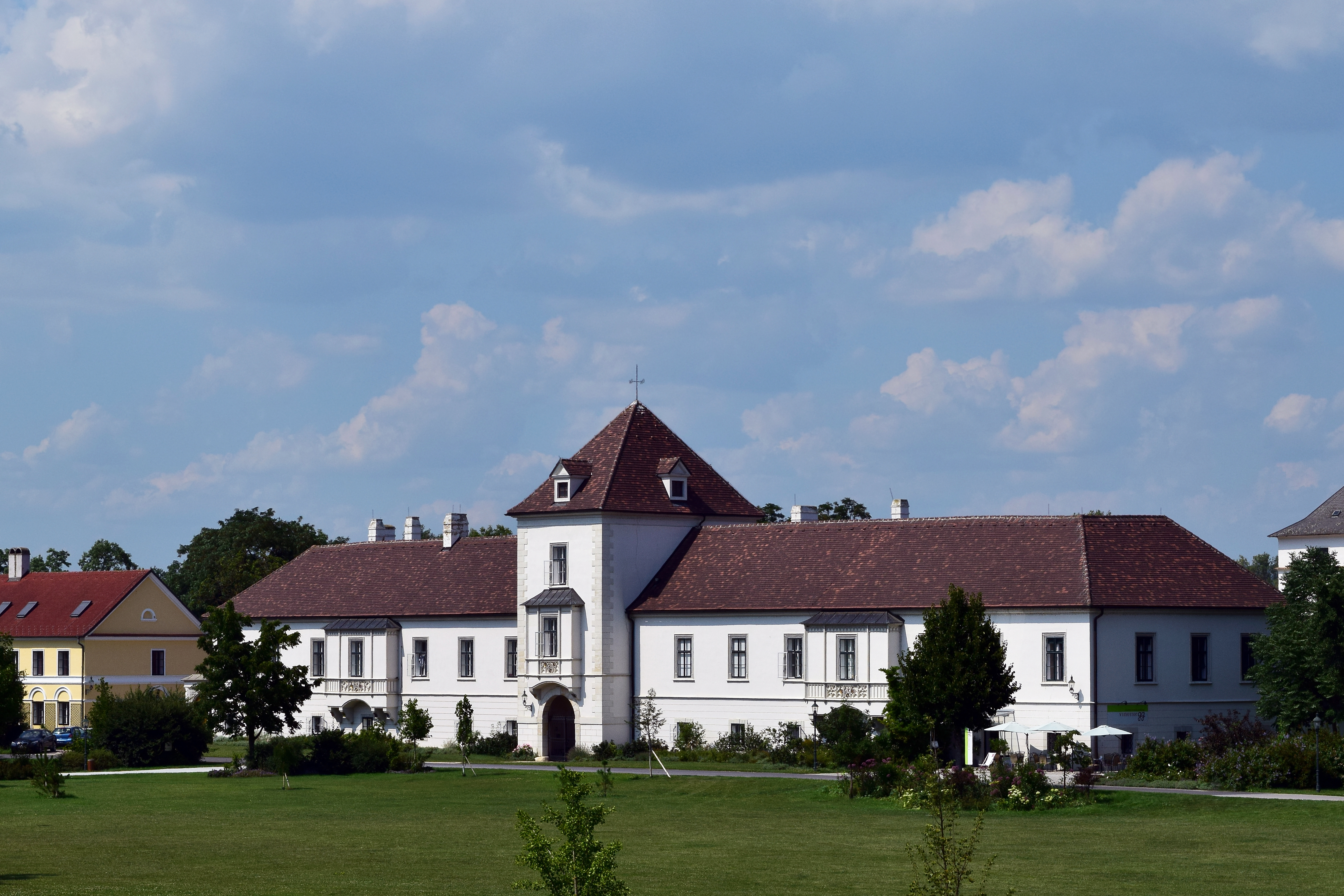 Gutshofsiedlung des Schlosses Grafenegg Dieses Bild wurde anlässlich des österreichischen Tags des Denkmals 2014 in Niederösterreich eingereicht.